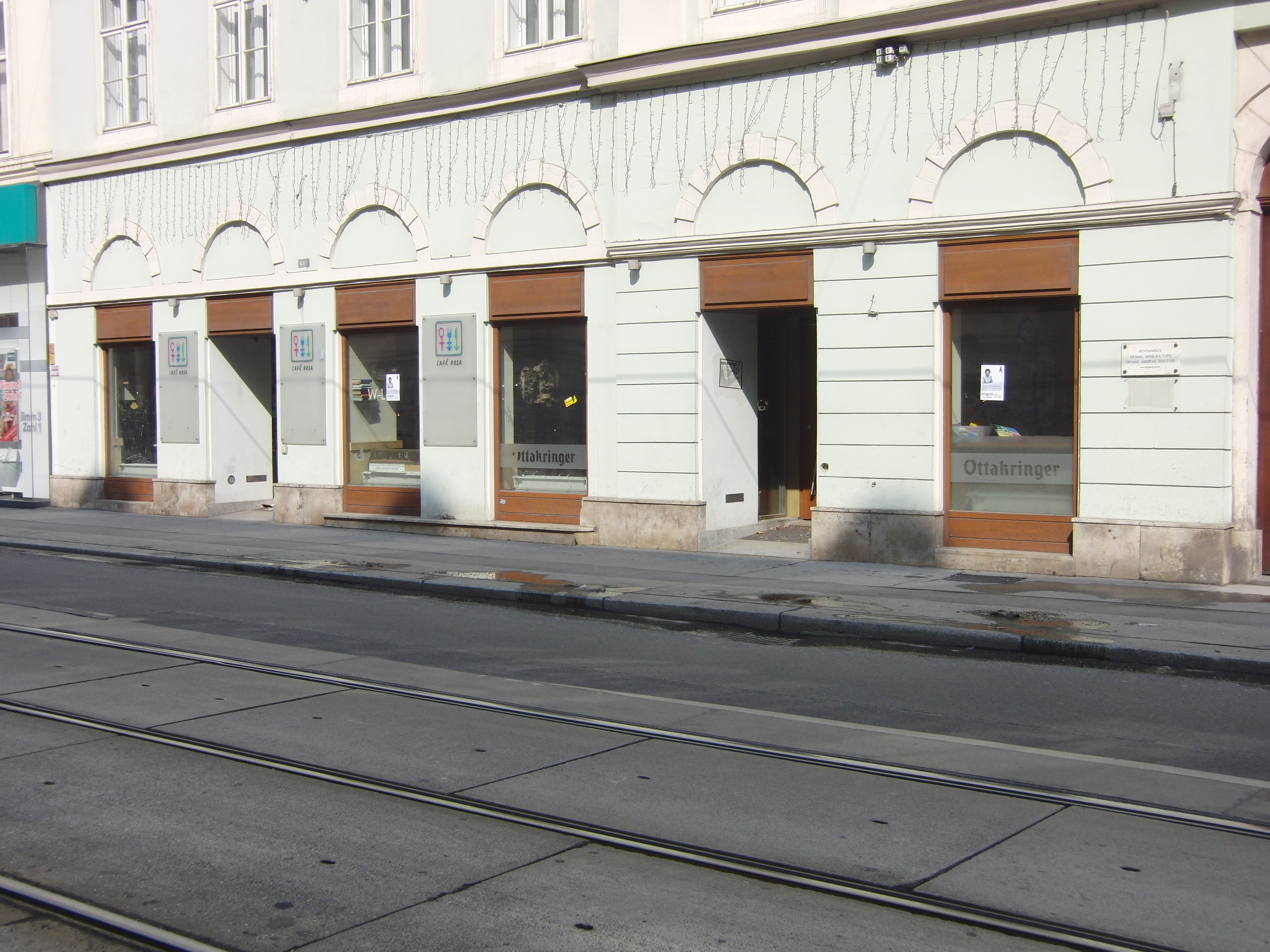 Café Rosa in Wien Alsergrund, Währinger Straße 18a. Gegründet von der Österreichischen HochschülerInnenschaft.